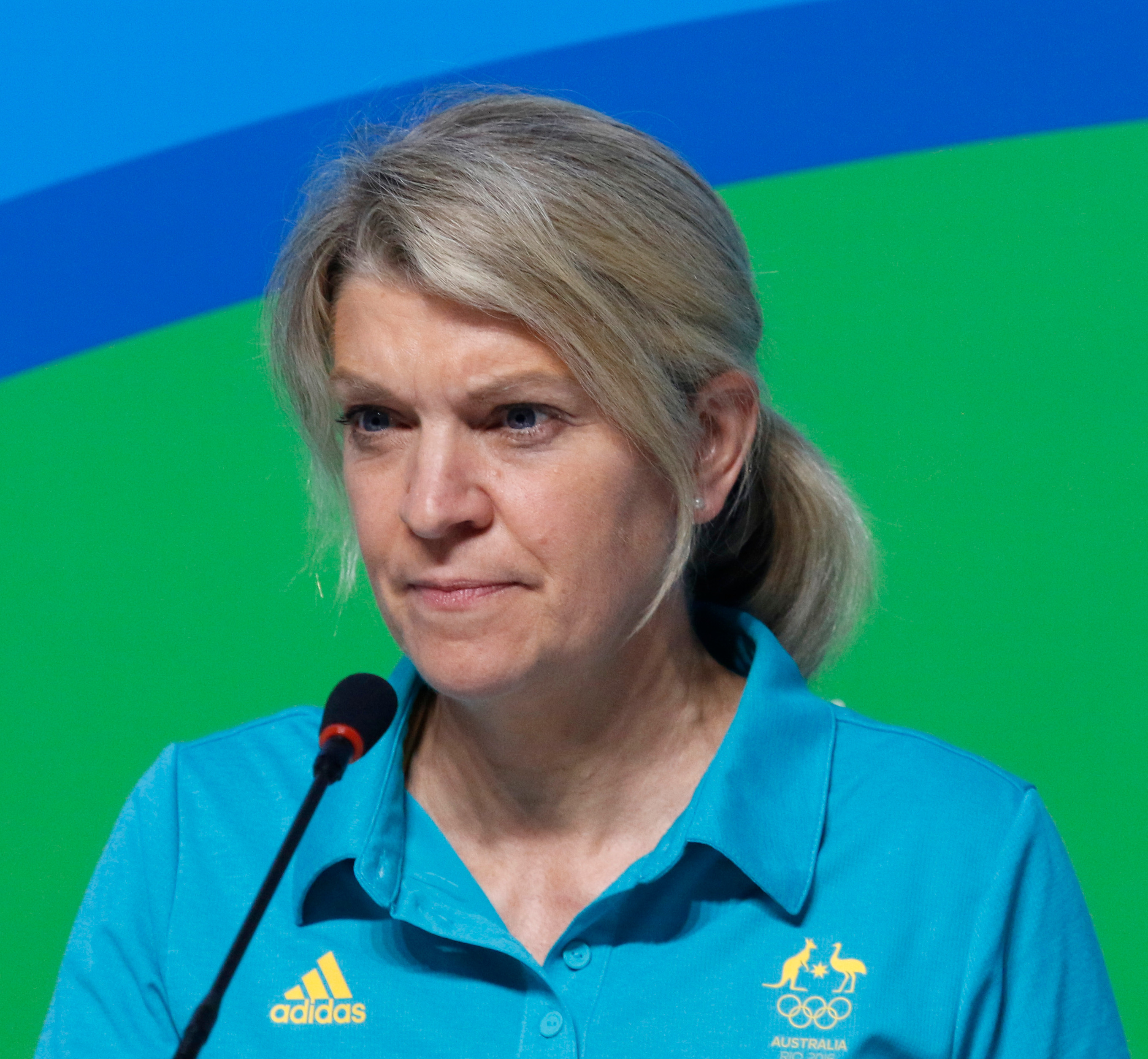 Rio de Janeiro - A chefe de missão da Austrália na Rio 2016, Kitty Chiller, anuncia ida da delegação para prédio na Vila Olímpica, durante entrevista no Parque Olímpico (Fernando Frazão/Agência Brasil)